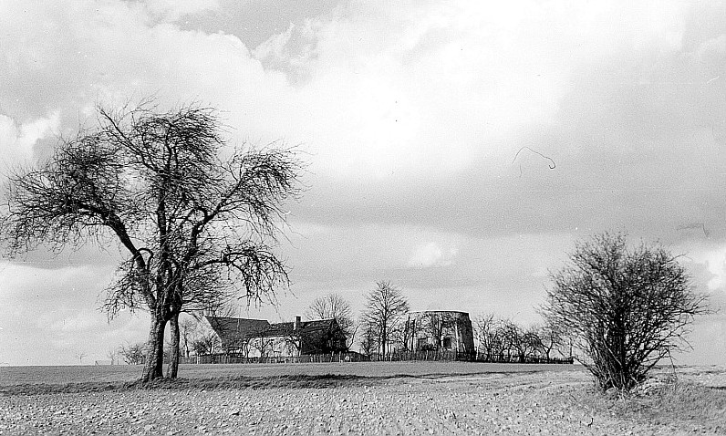 Original image description from the Deutsche FotothekRadeberg-Großerkmannsdorf. Ehem. Windmühle